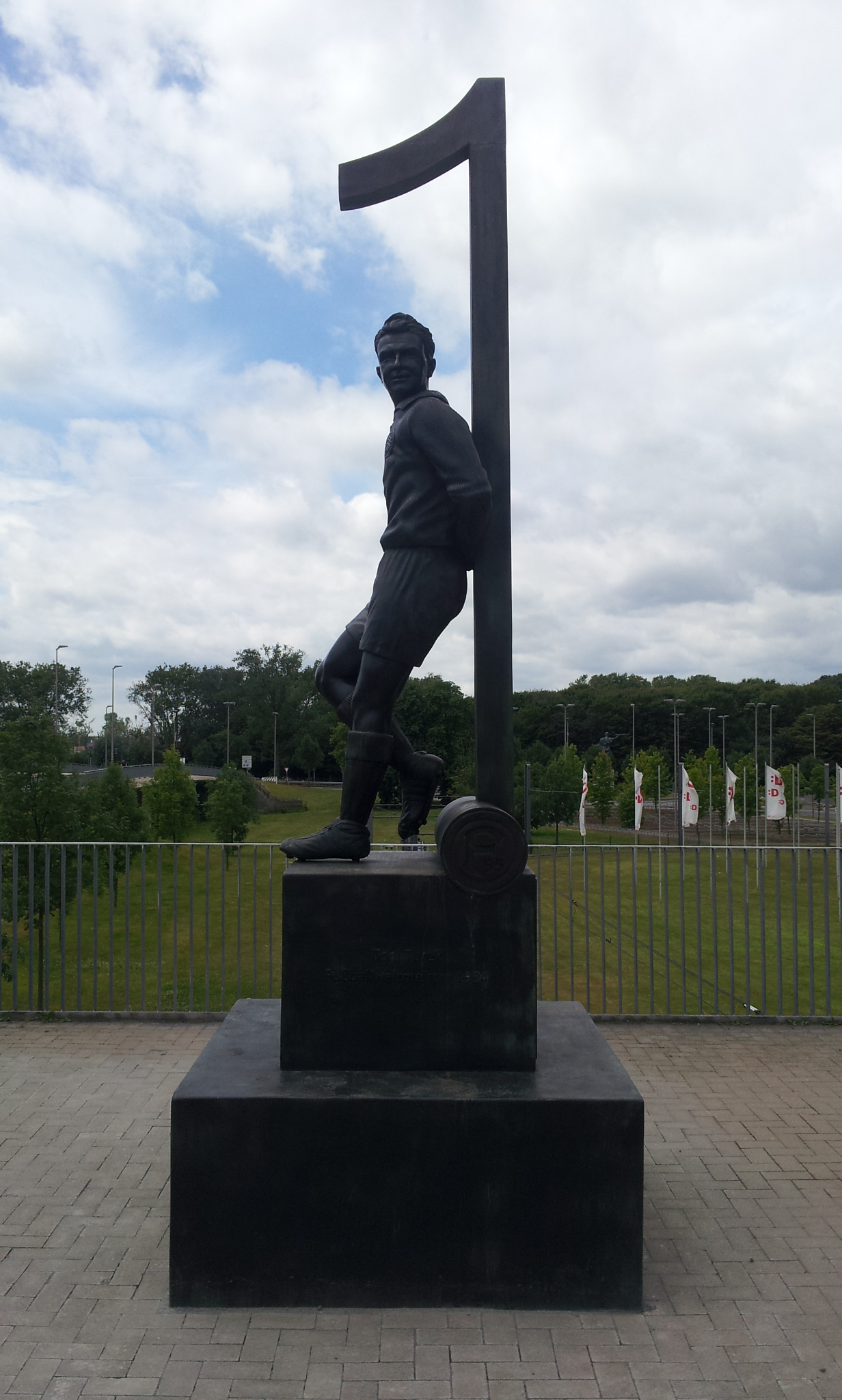 Bronzestatue von Toni Turek neben der ESPRIT Arena in Düsseldorf-Stockum. Bildhauer: Till Hausmann